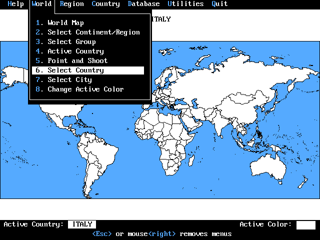 Schermata iniziale del software PC Globe